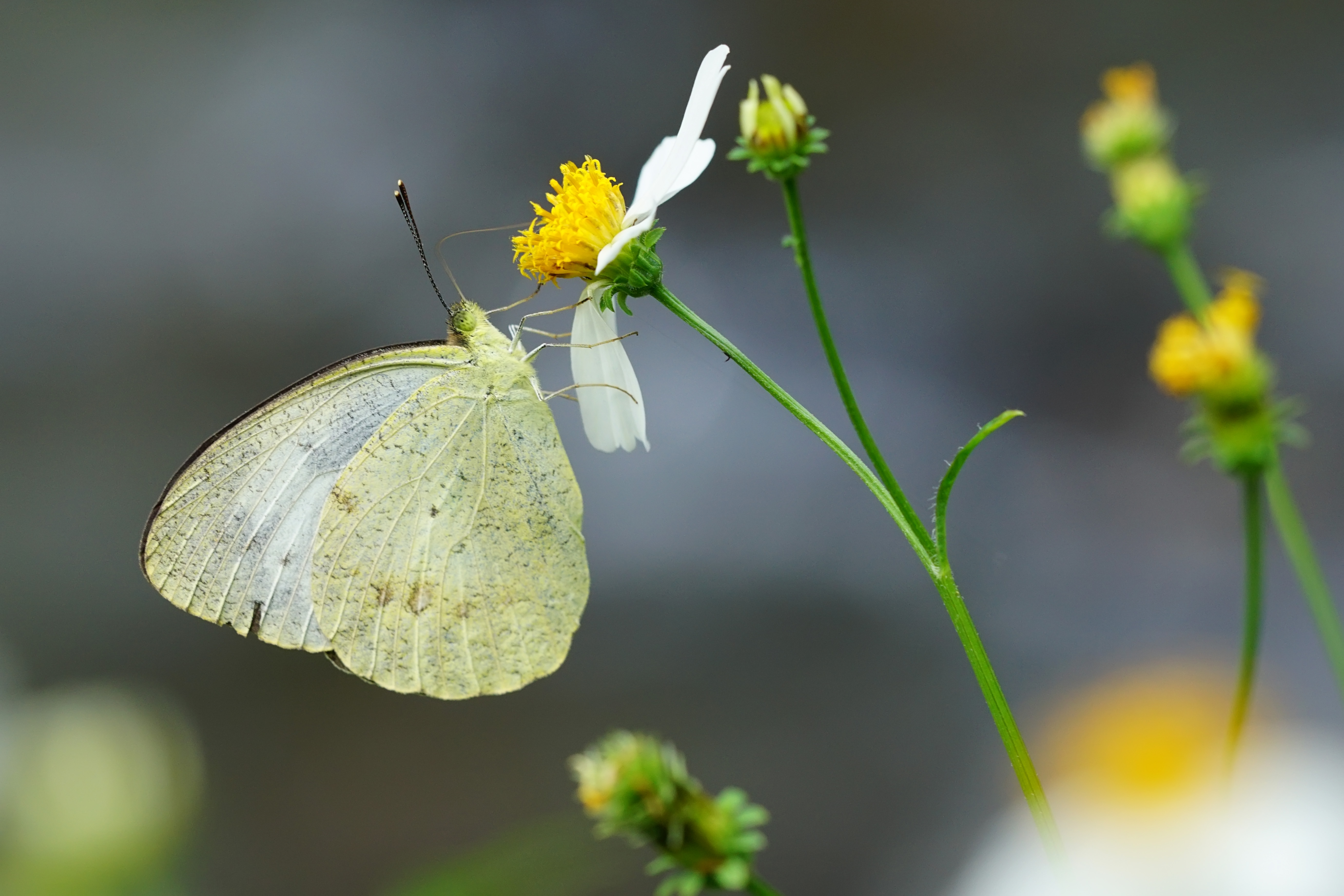 異粉蝶 Ixias pyrene insignis